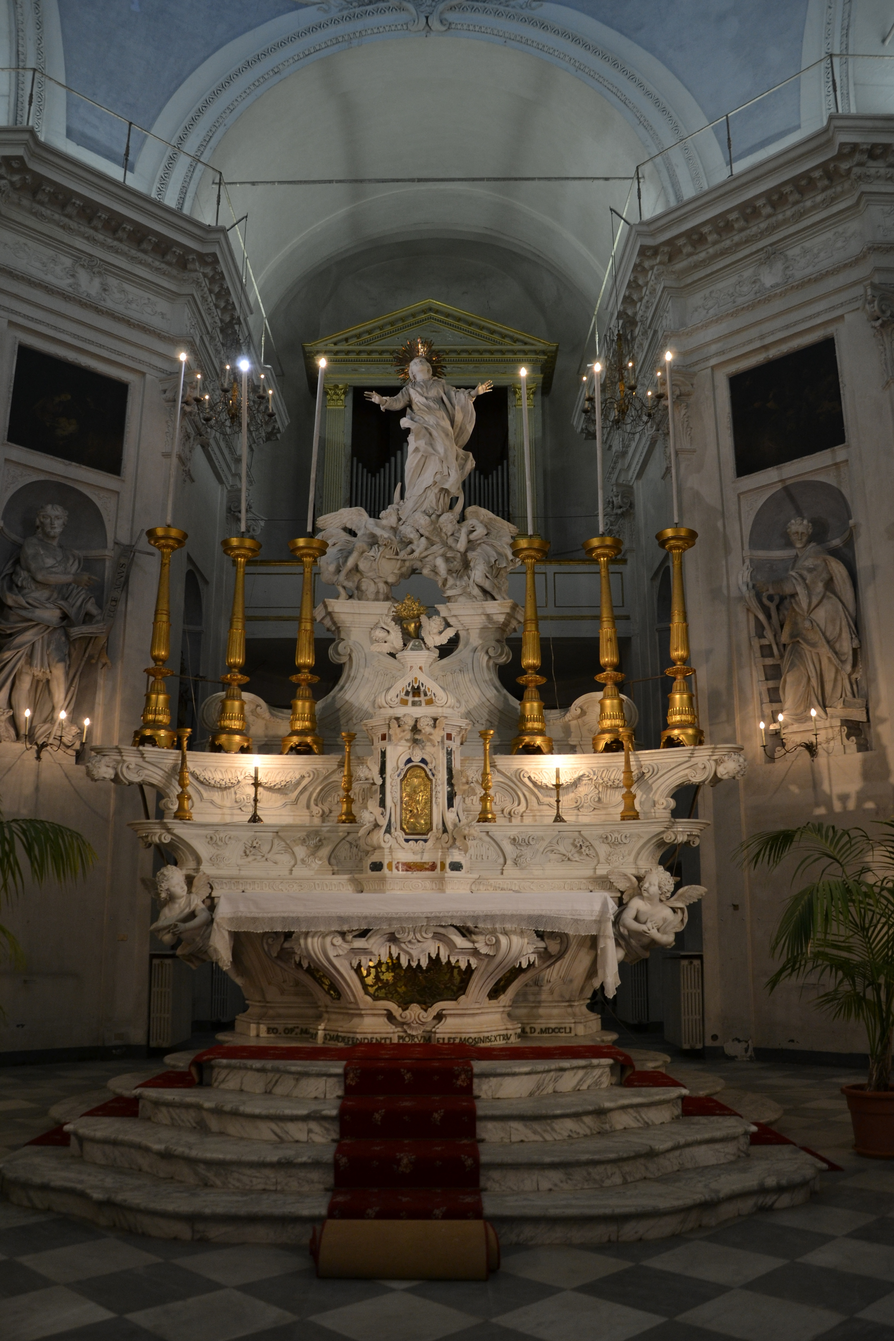 Pierre Puget, Altare dalla Chiesa dell'Albergo dei Poveri